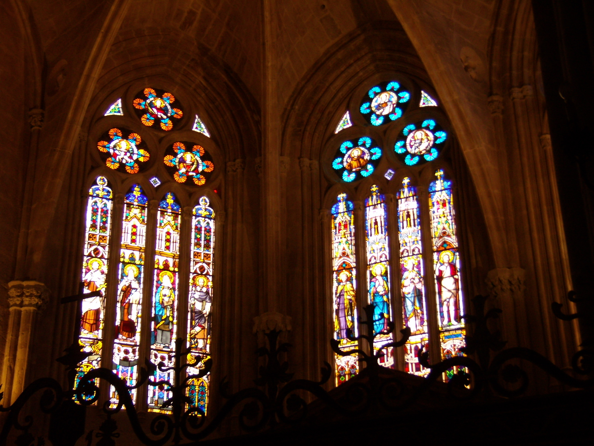 Vidrieras de la Catedral de Palencia.